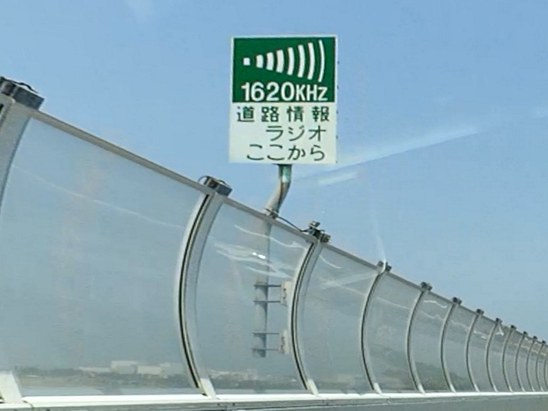 阪神高速 路側放送標識（ここから）